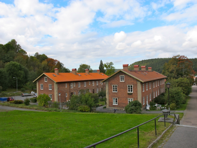 Jonsered: arbetarbostäder nedanför kyrkan, september 2013